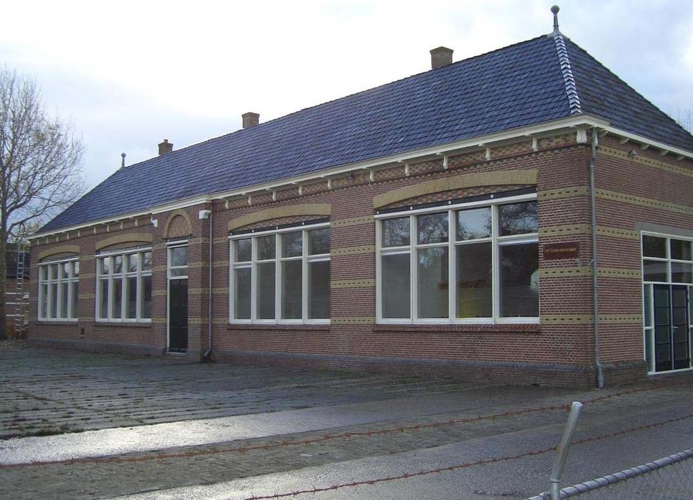 De âlde skoalle oan de Boarnsylsterwei yn Jelsum.